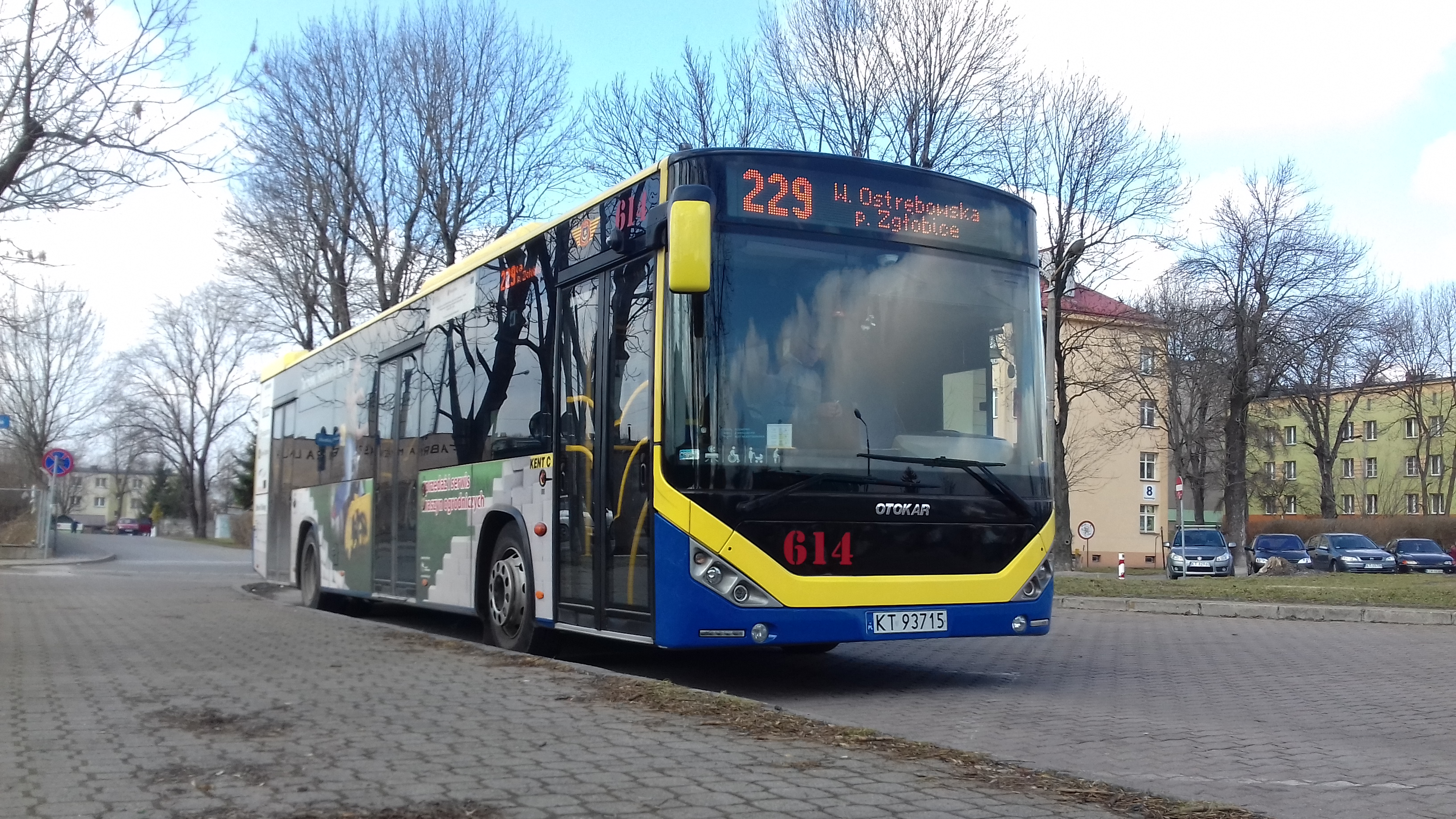 Otokar Kent C MPK Tarnów